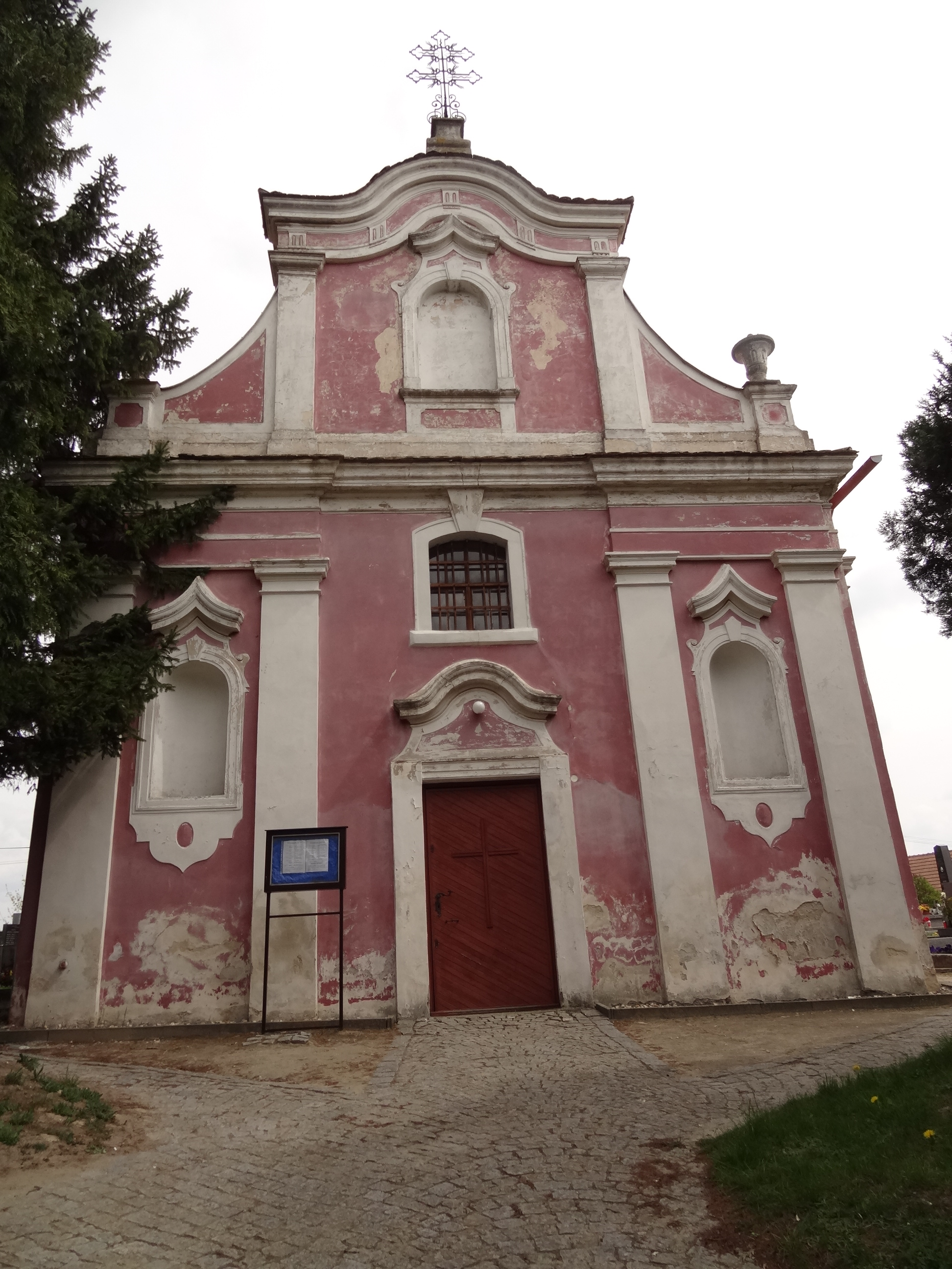 Hřbitovní kostel svatého Jana Křtitele, Byšice.